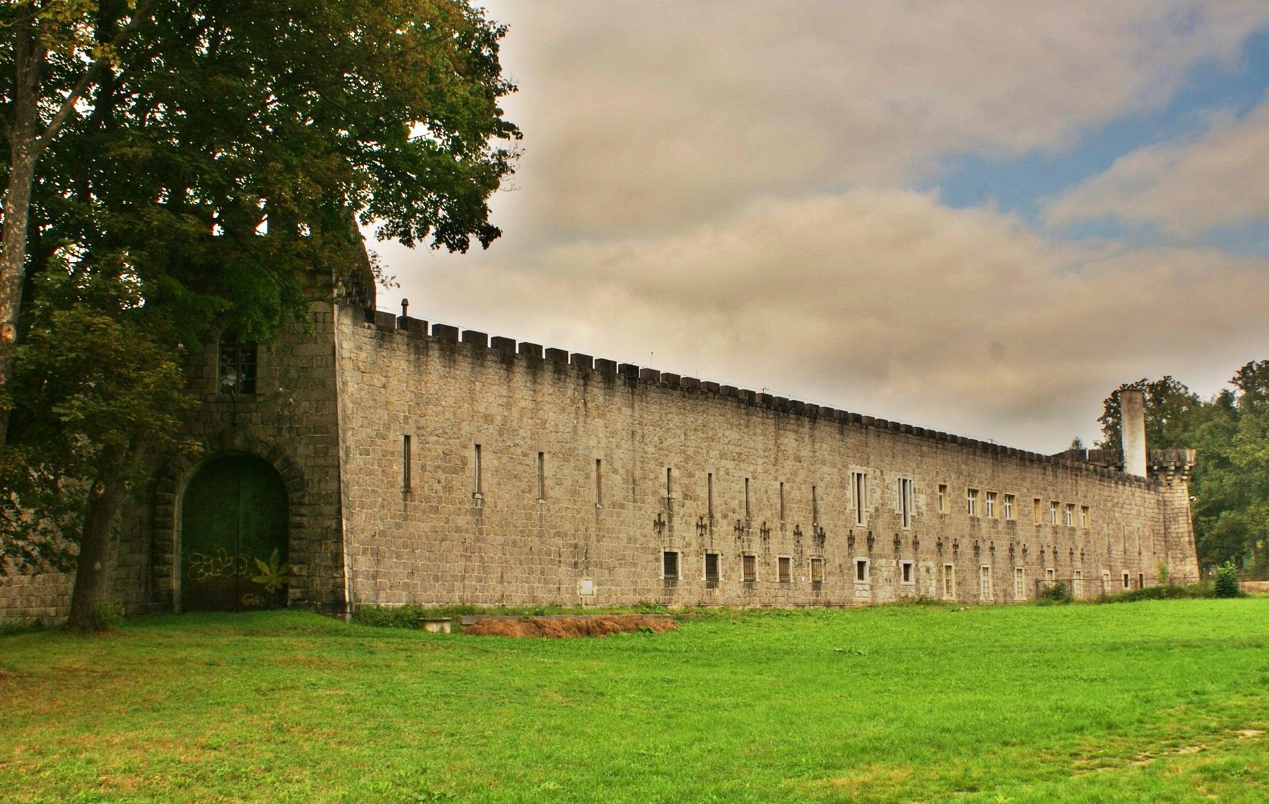 Zespół pałacowo-folwarczny w Bobrowie - mur z narożnymi basztami i bramą wjazdową od strony południowo-wschodniej (zabytek nr 670/A/1-5/05 z dn. 24.01.06)